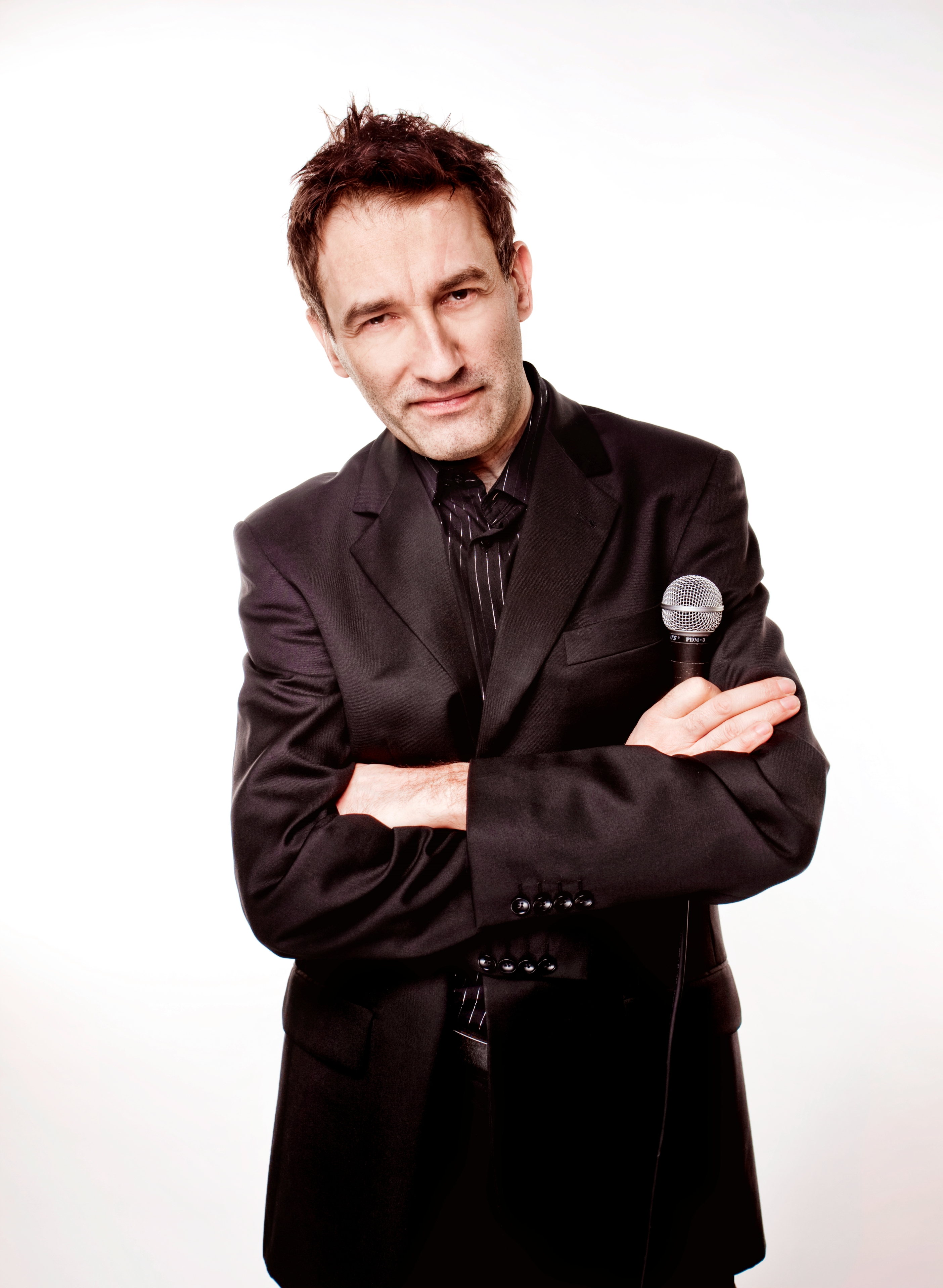 Janusz Szrom, Wrocław 2010